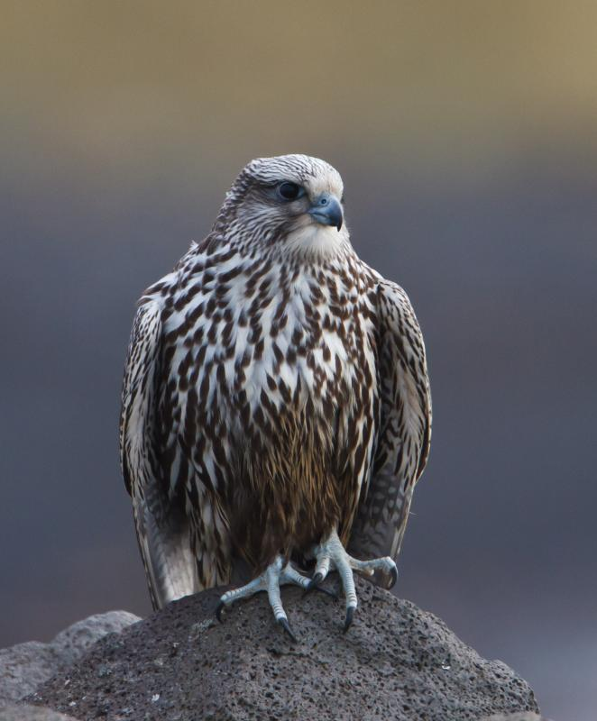 Gyr falcon - Falco rusticolus, Iceland